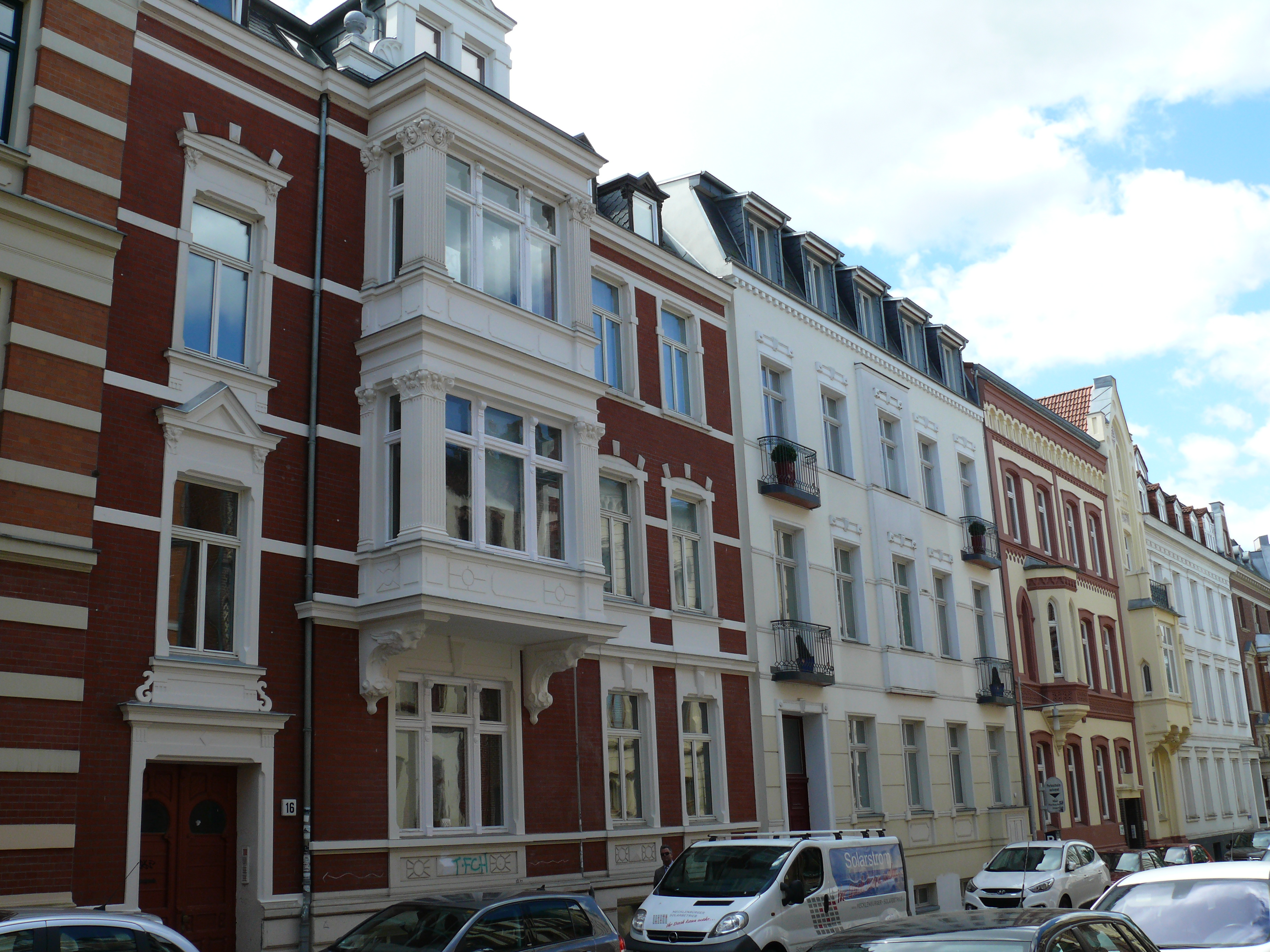 Die Gebäude "Körnerstraße 16 + 18" in Schwerin.